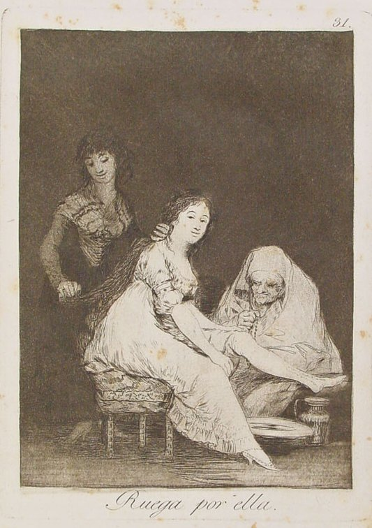 Capricho nº 31: Ruega por ella de Goya, serie Los Caprichos